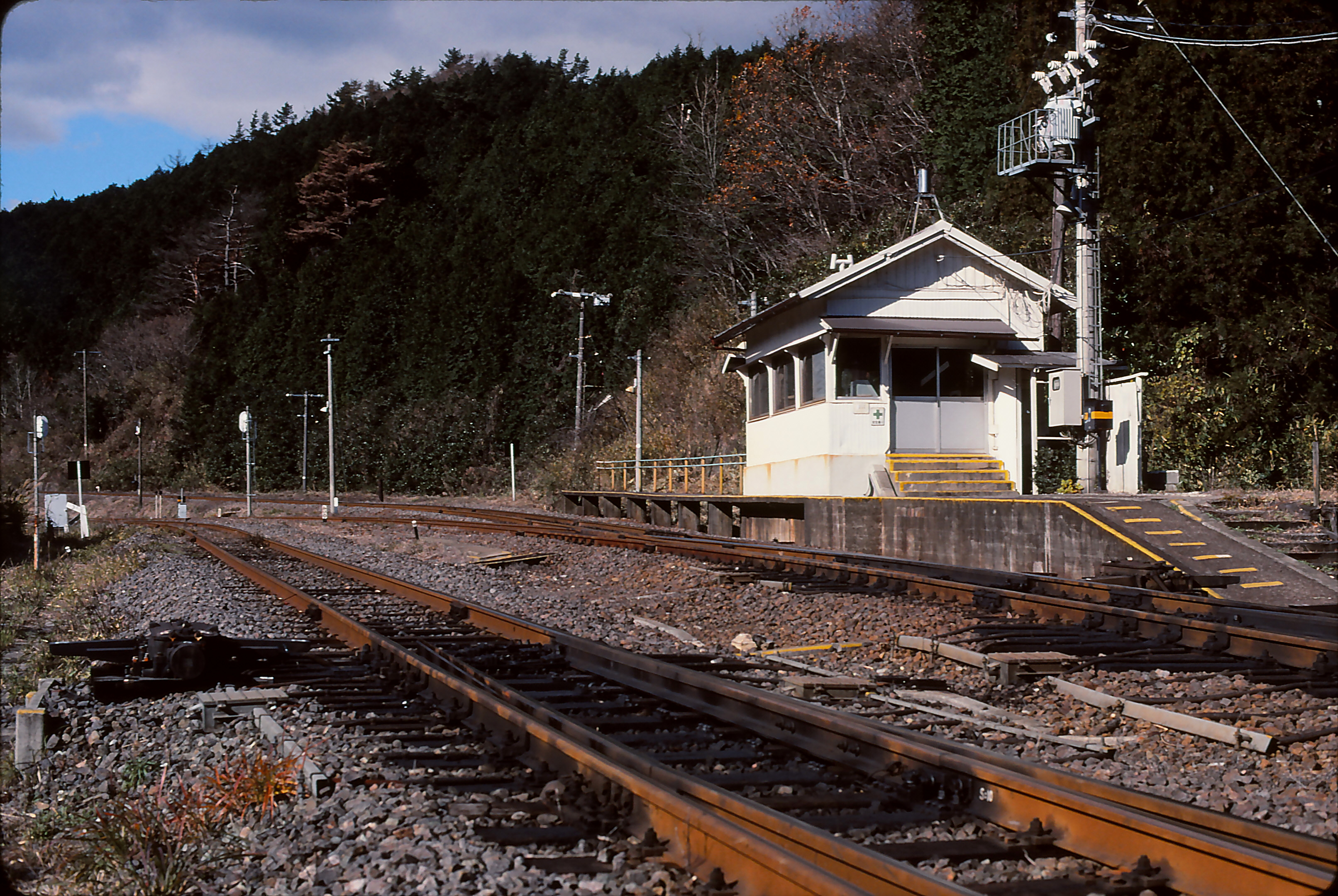 信号場小屋 1990年撮影 三重県亀山市加太中在家